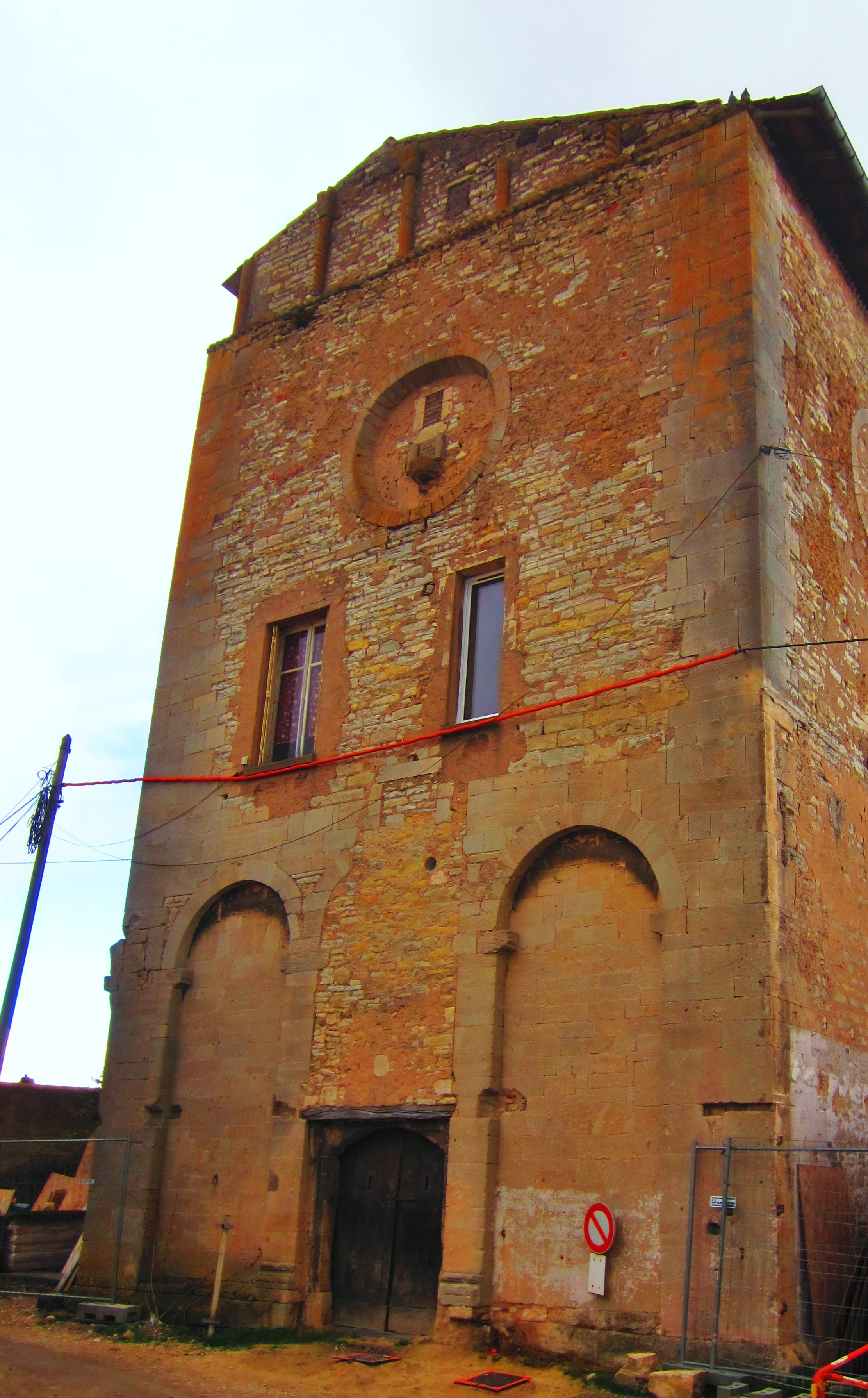 Varangeville prieure